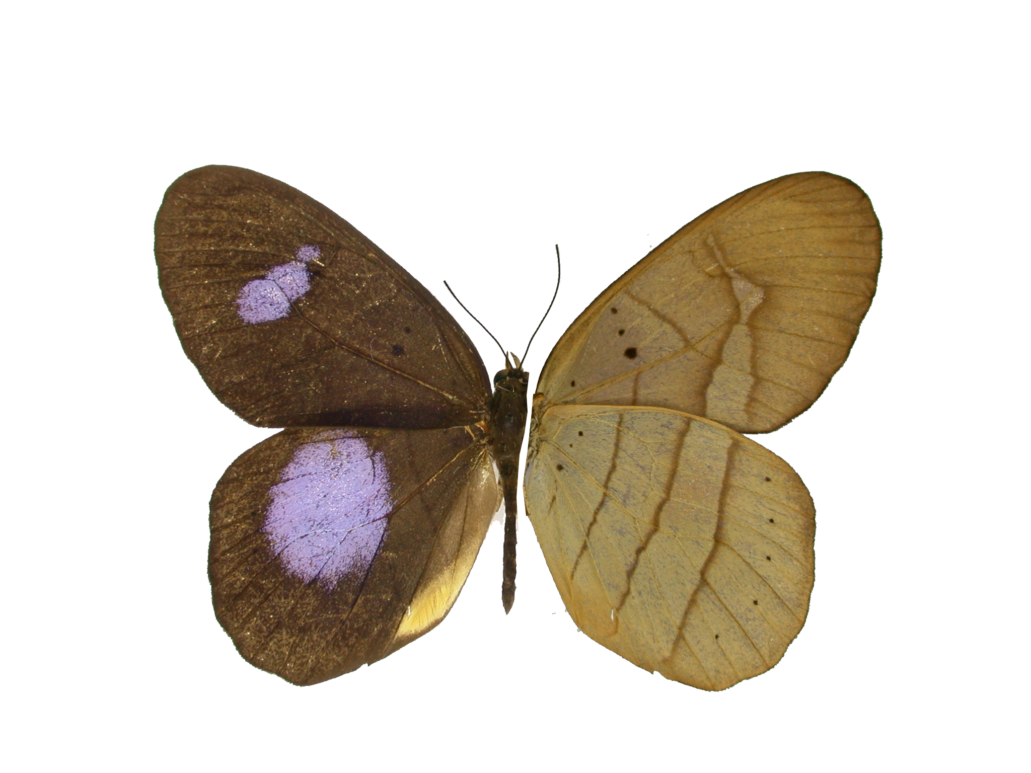 Nymphalidae Ecuador